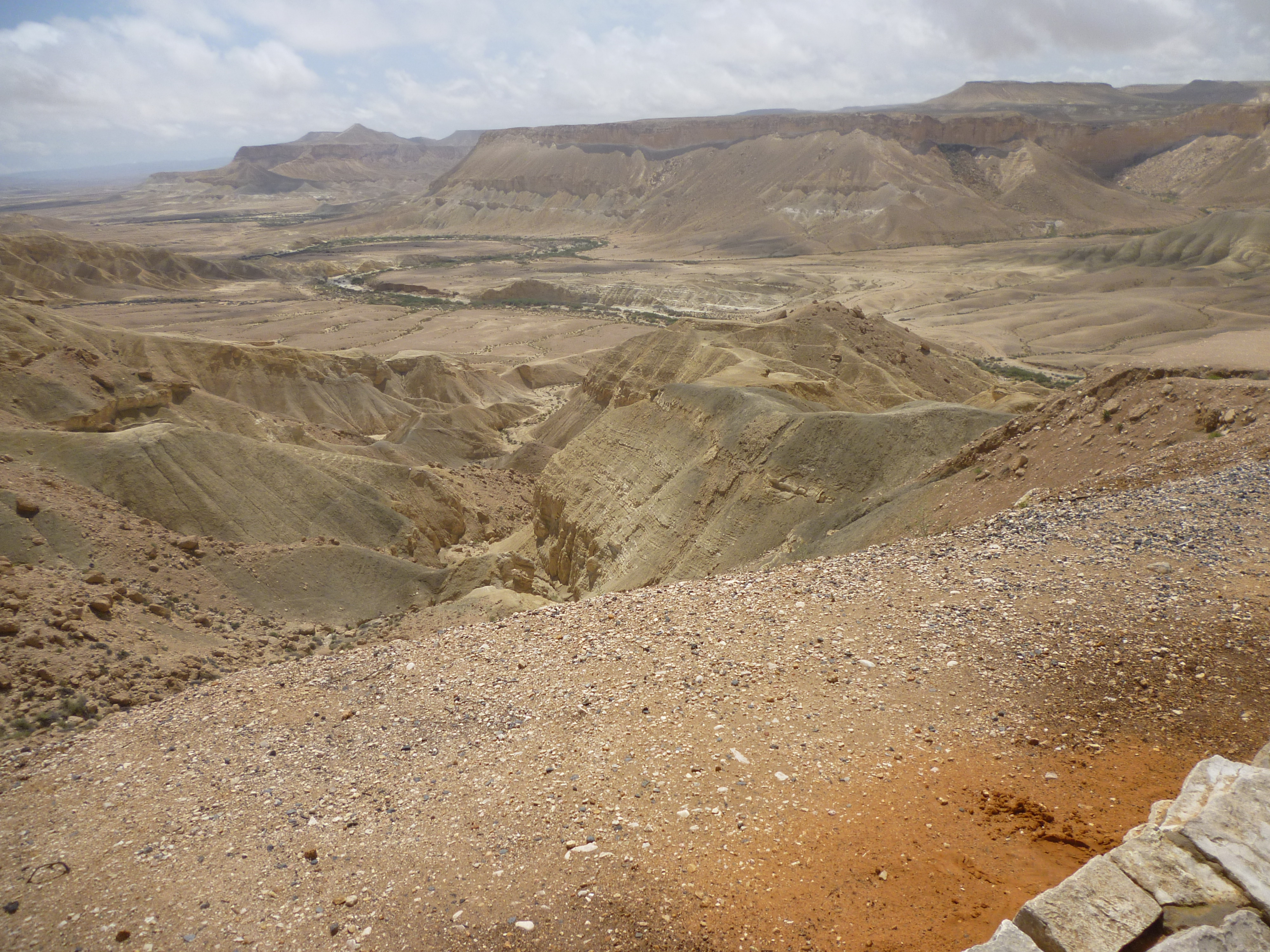 קבר דוד בן גוריון ופולה בשדה בוקר מבט אל מדבר צין